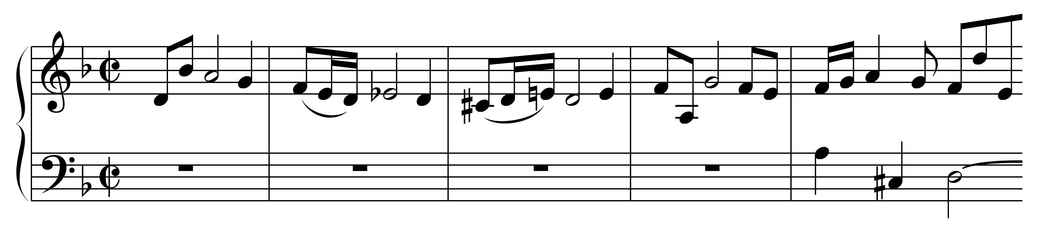 Bach, JS, Incipit Contrapunctus 14, BWV 1080